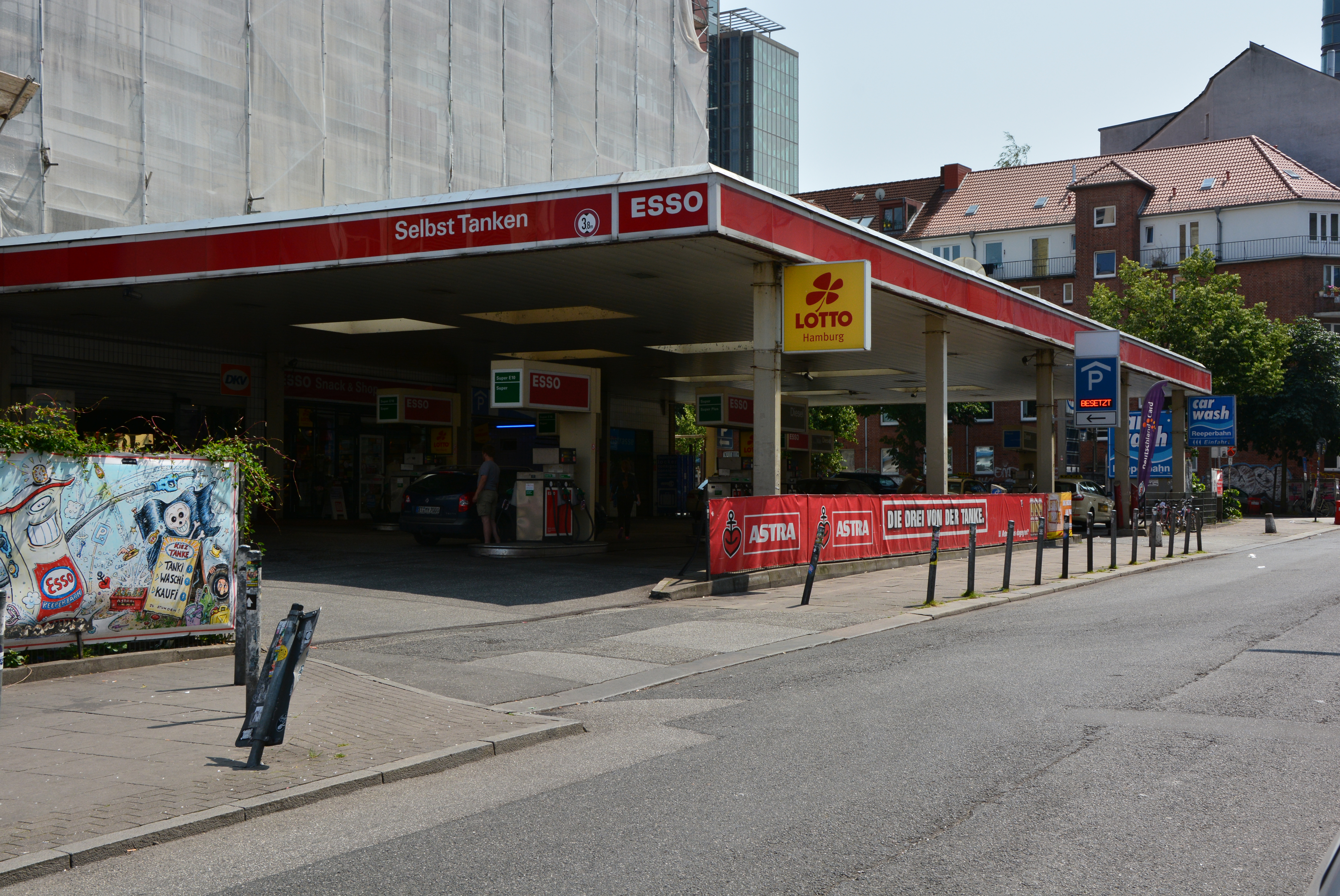 Die Esso-Station in Hamburg-St.Pauli